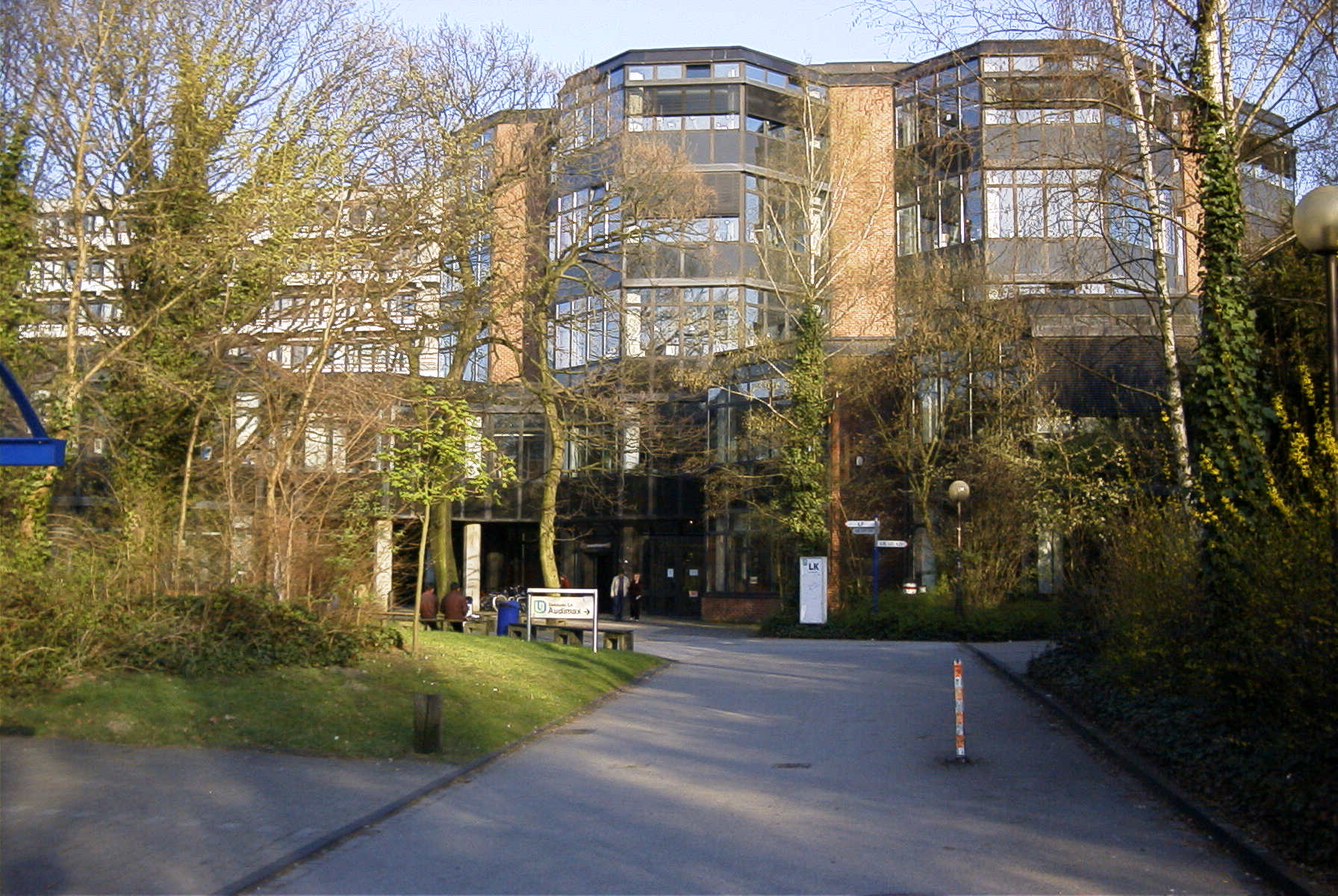 Universität Duisburg-Essen, Campus Duisburg - Universitätsbibliothek / Nordrhein-Westfalen